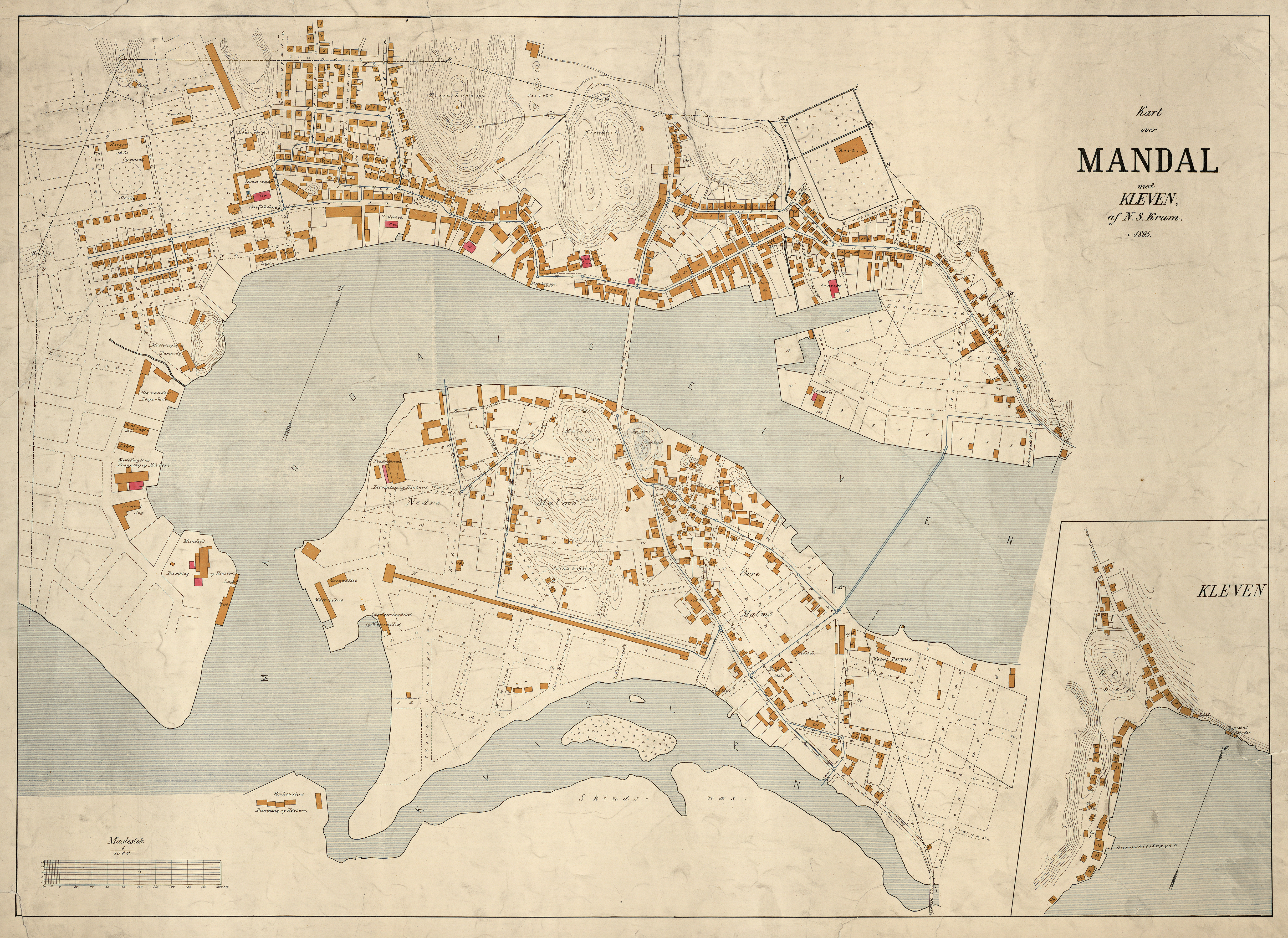 NS Krums kart over Mandal fra 1895.